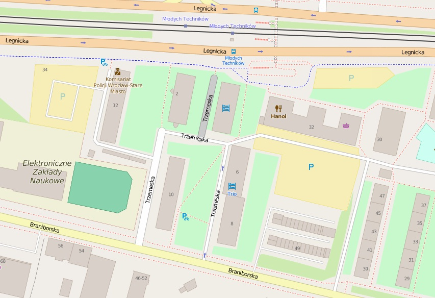 Ulica Trzemeska - plan, m.in. komisariat Policji Wrocław-Stare Miasto.